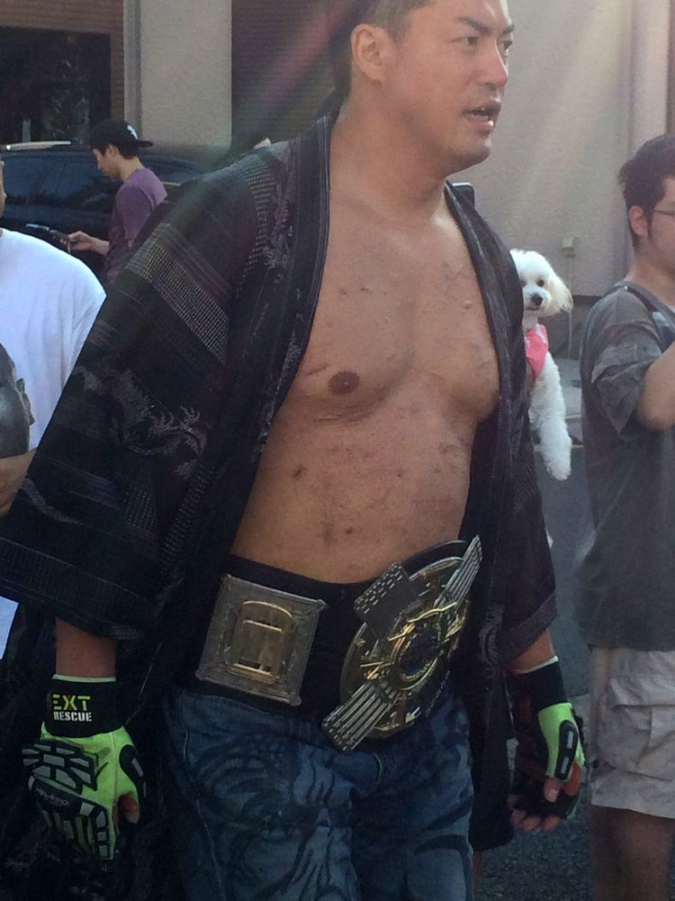 小机商店街